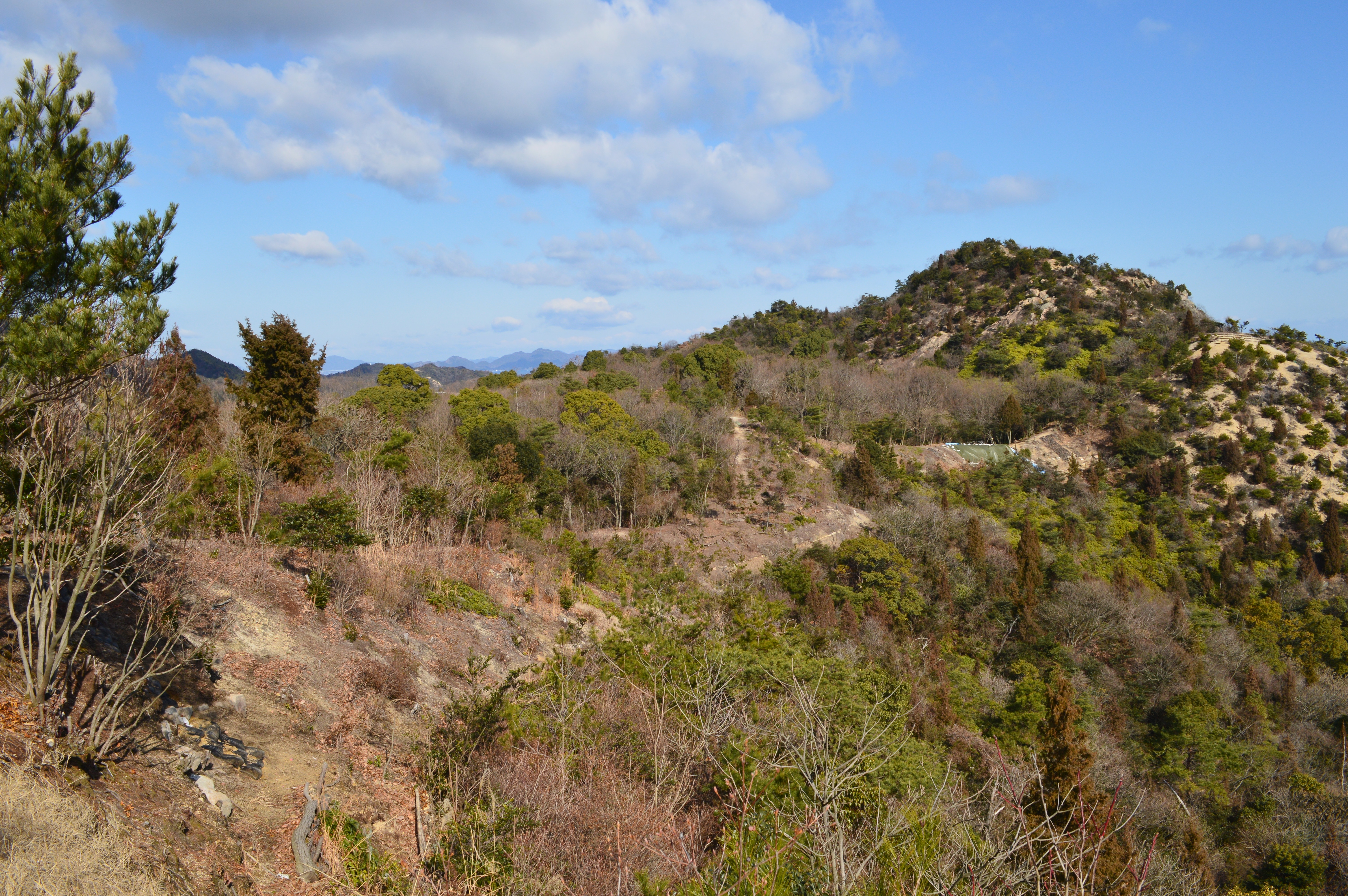 永納山城跡 城壁線 (南東部頂上から山頂を望む)